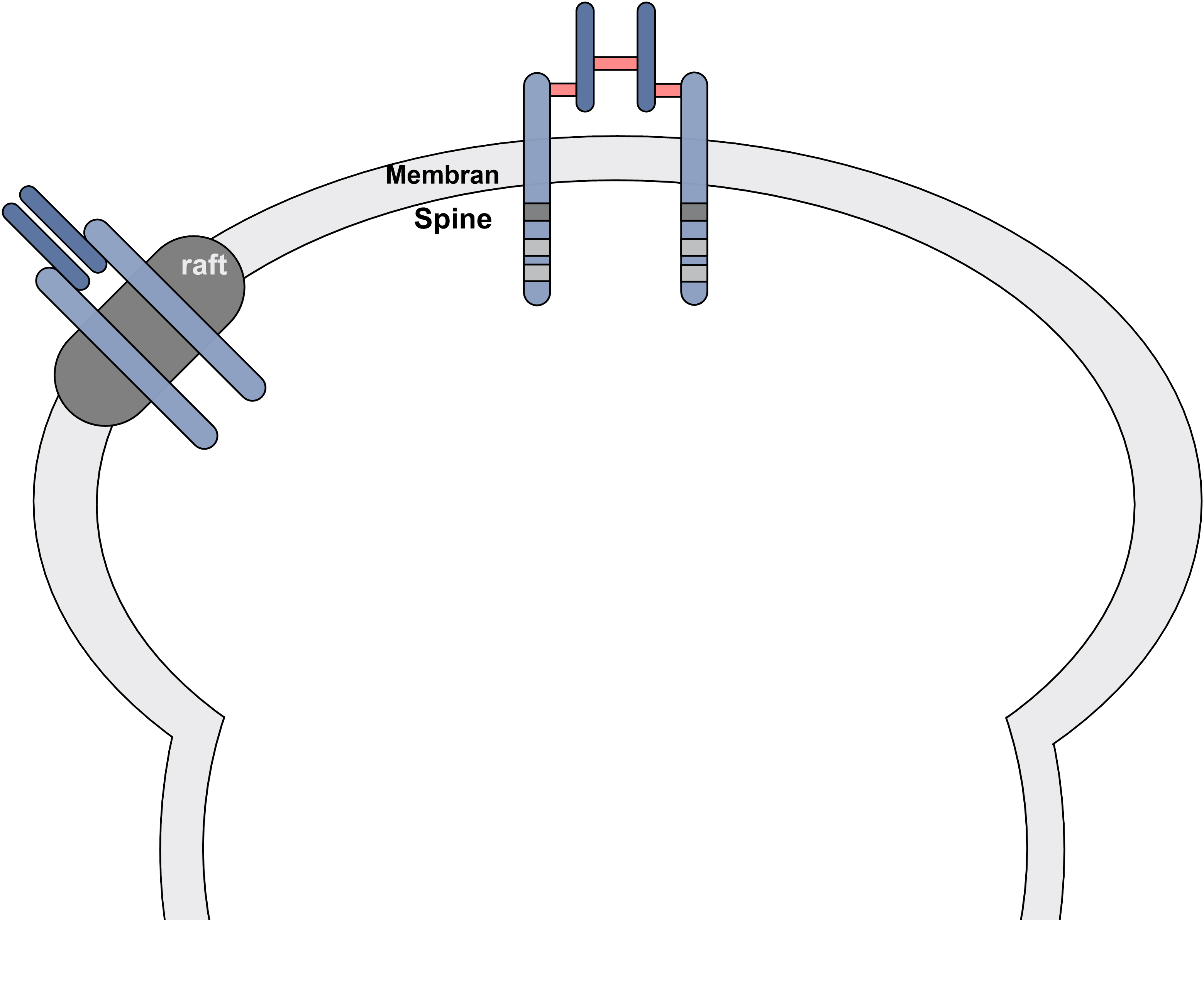 Insulinrezeptor im neuronalen Spine